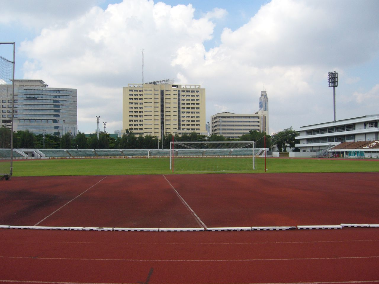 Thai-Japanese Stadium